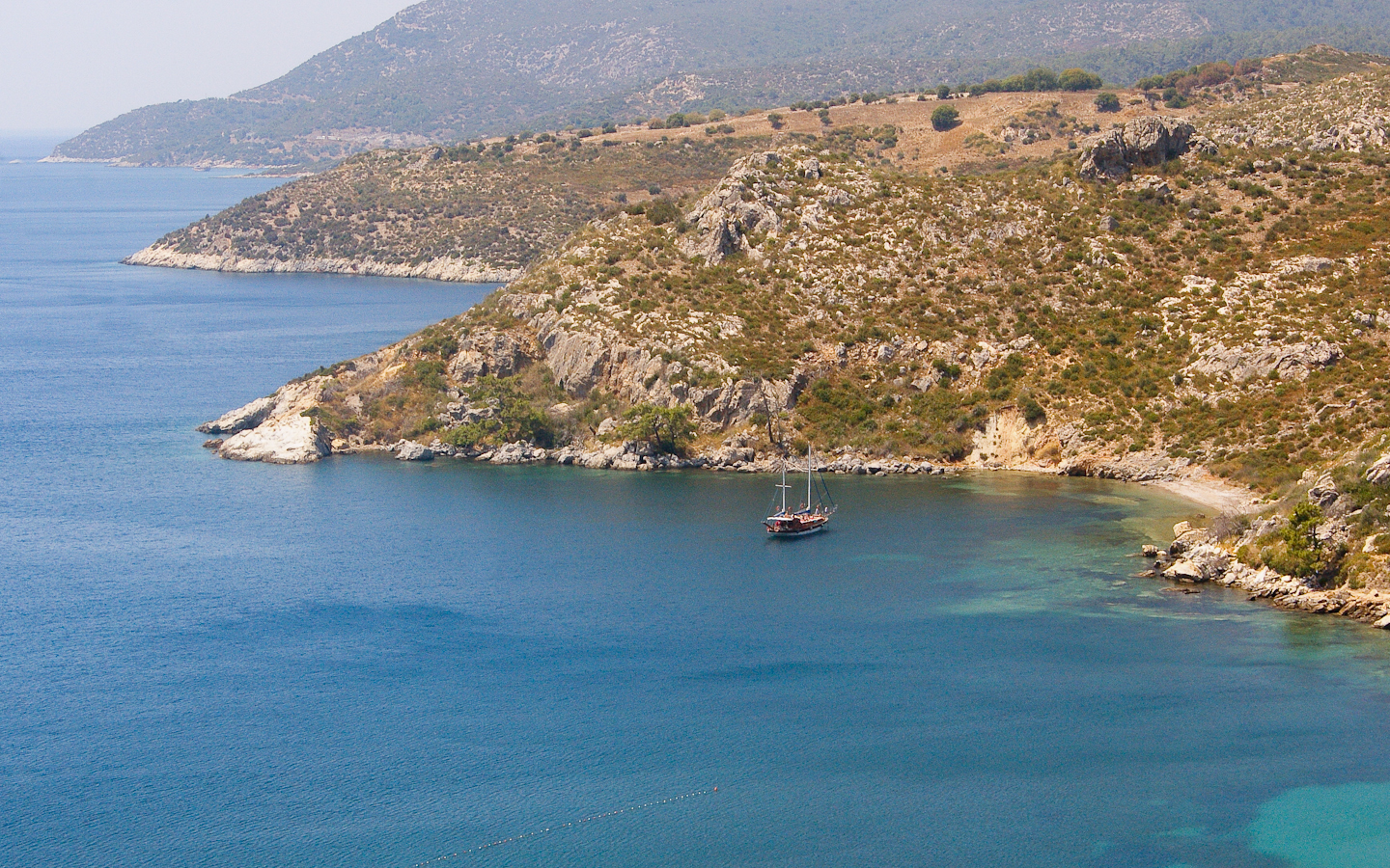 Bucht in Izmir, Türkei